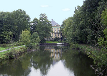 Hagenburger Kanal am Schloss Copyright: GNU FDL HagenburgKanal.jpg (für die GNU FDL)